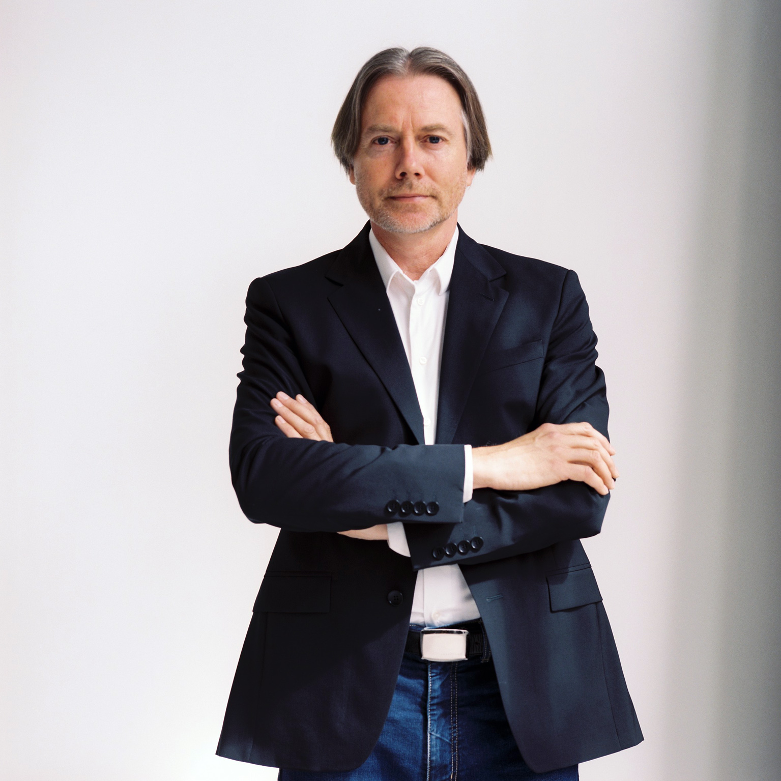 portree